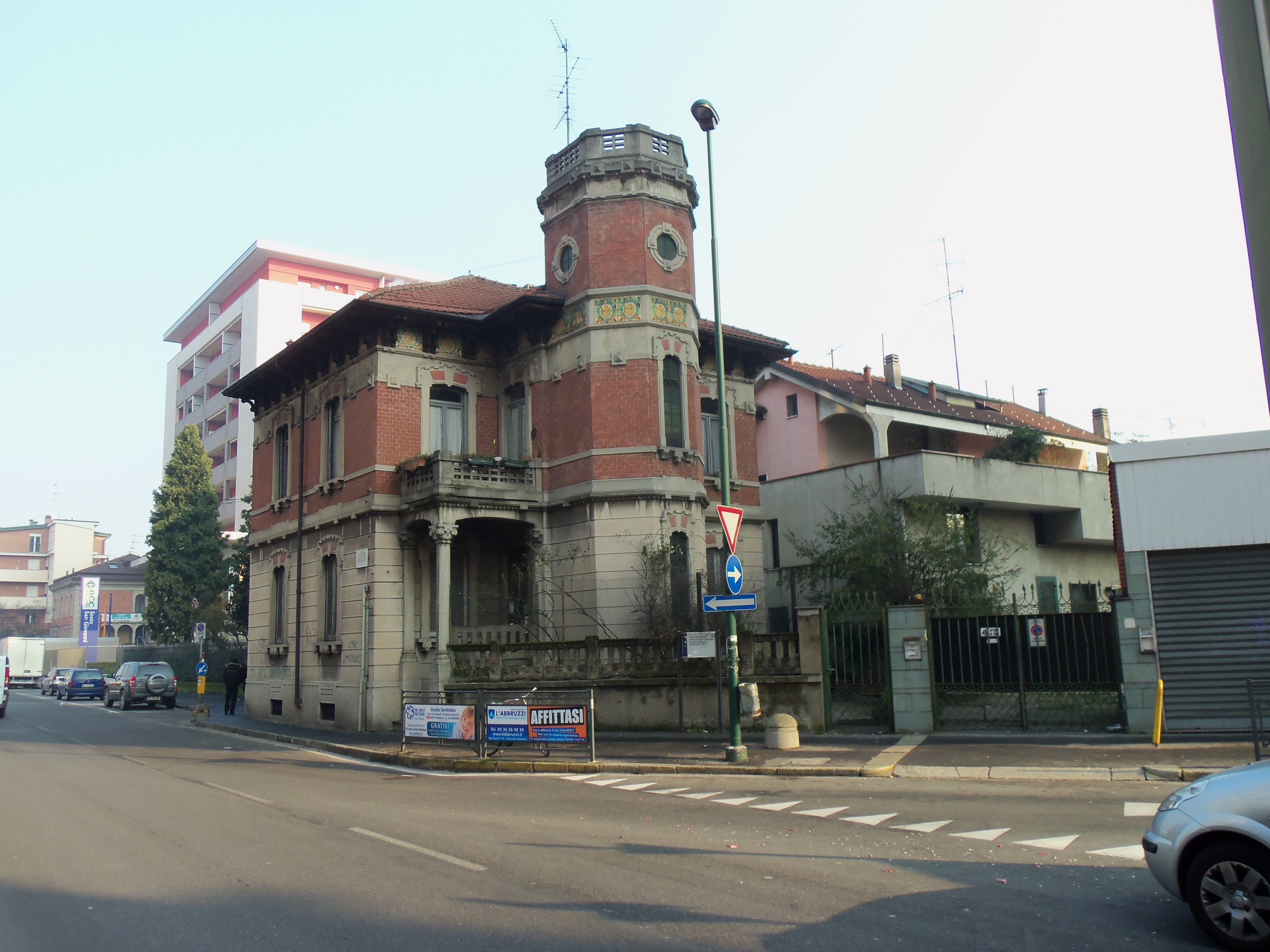 Edificio in viale Antonio Gramsci 186 a Sesto San Giovanni.